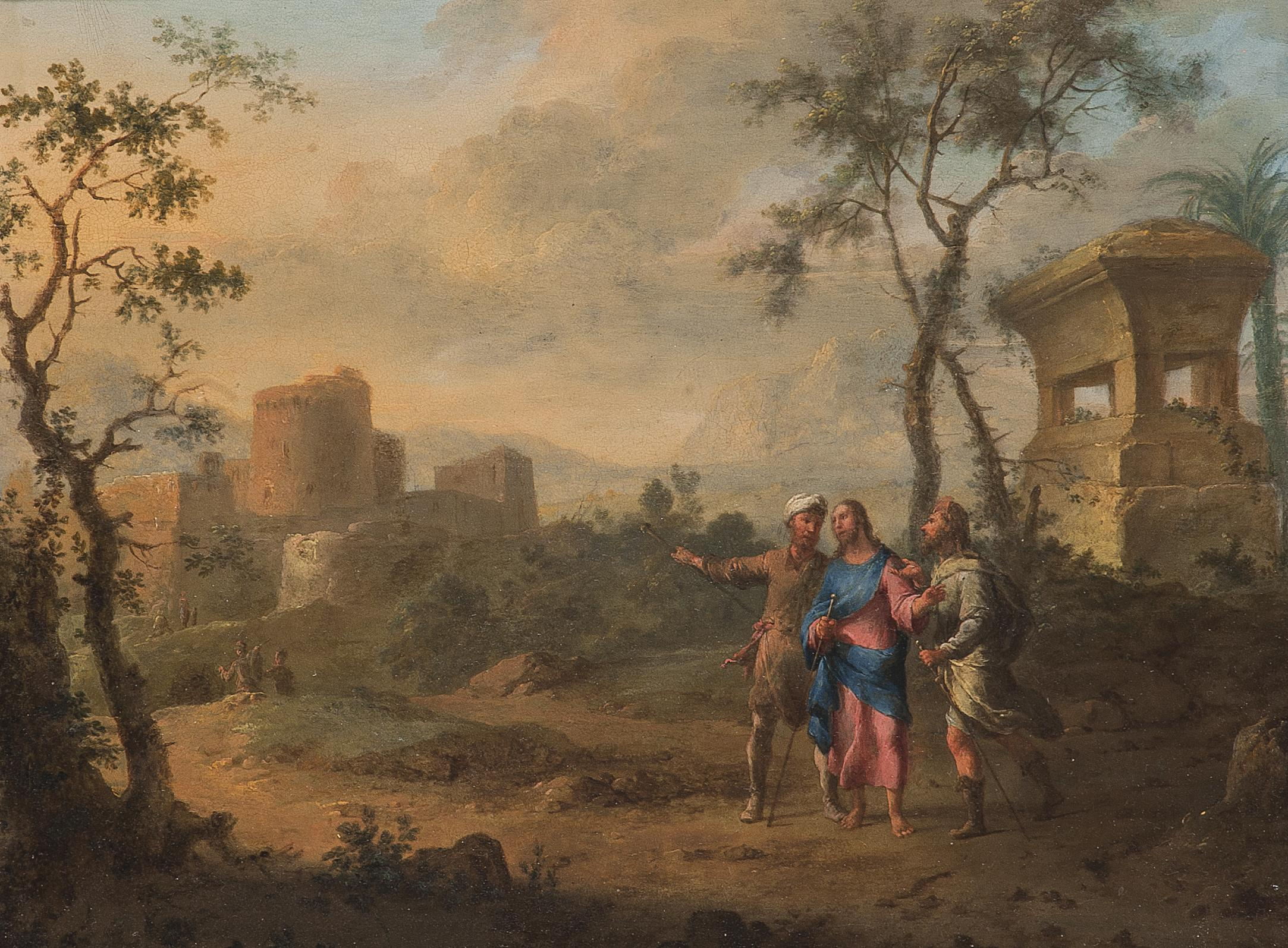 Auf dem Weg nach Emmaus